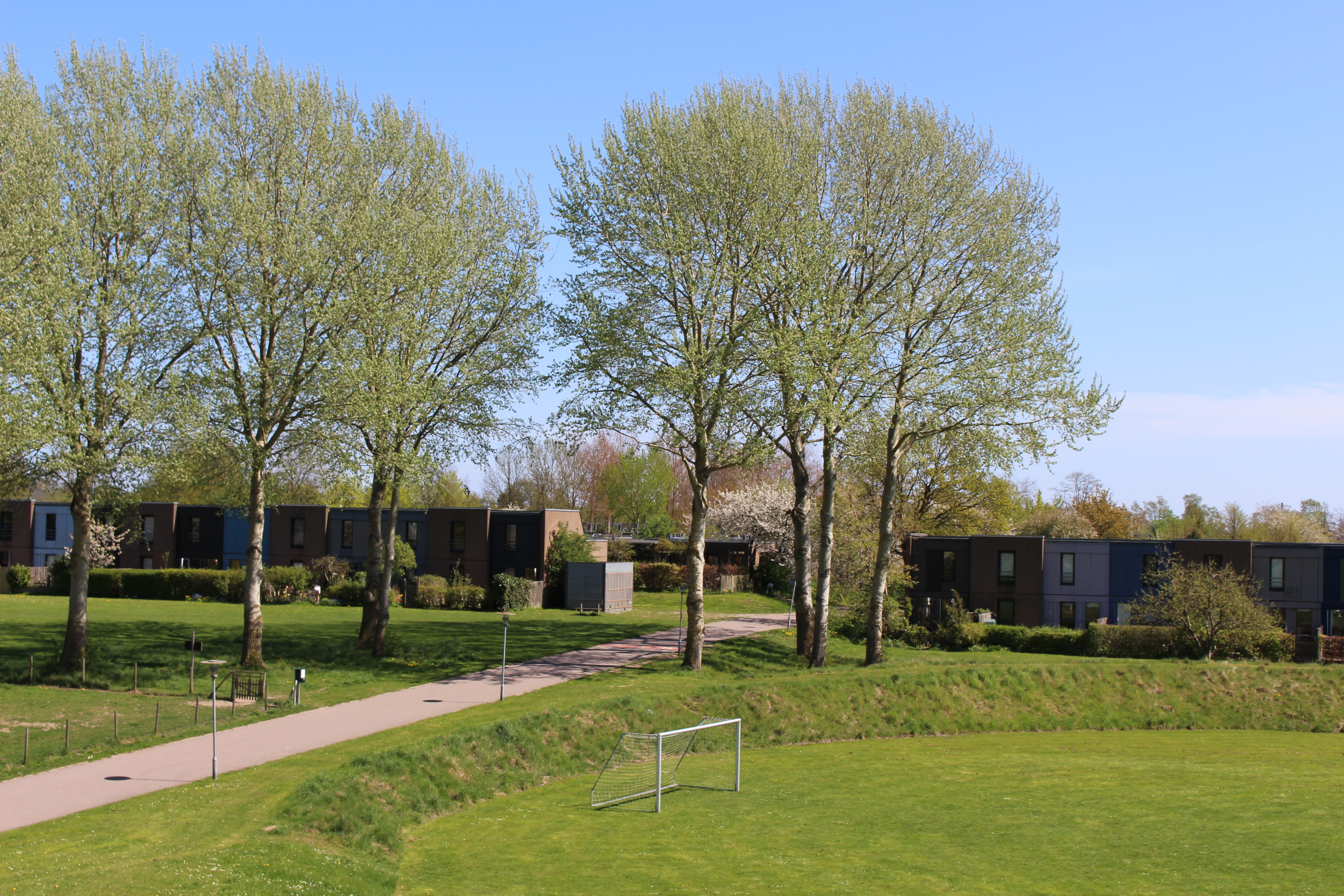 Grønt område i Galgebakken